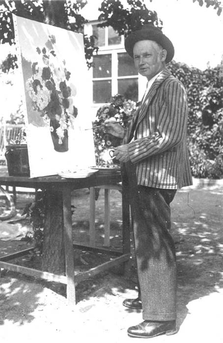 Alois Mudruňka (1888 - 1956), Český malíř, grafik a pedagog